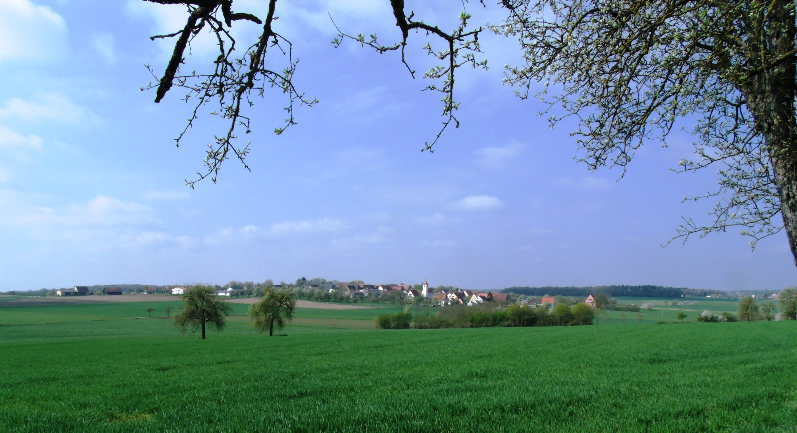 Adelshofen im mittelfränkischen Landkreis Ansbach